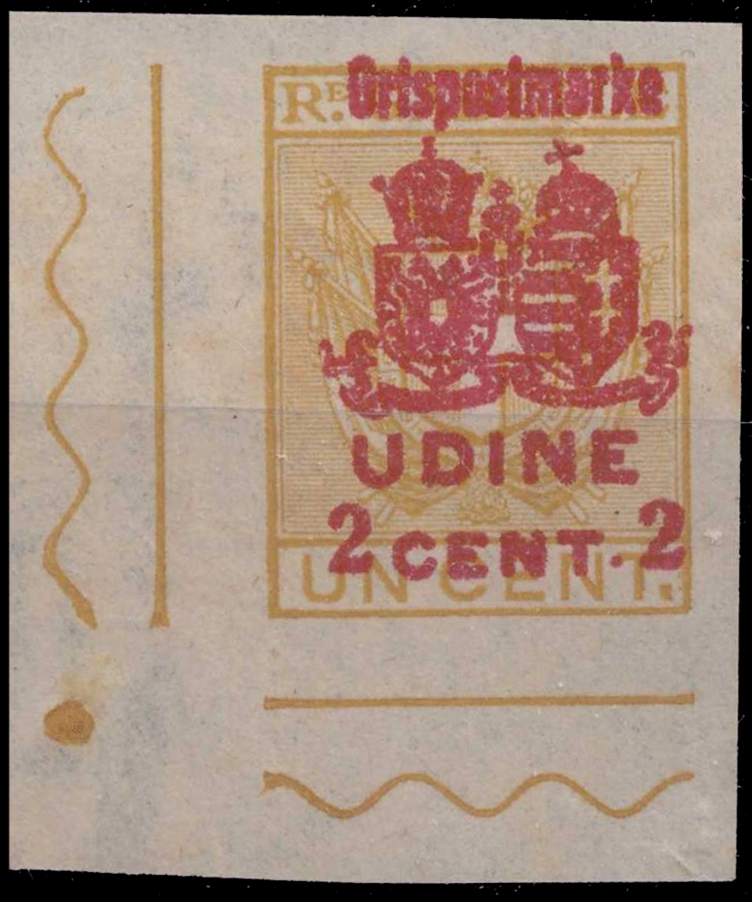 Почтовая марка австро-венгерских оккупационных властей для города Удине (Италия). Надпечатка на фискальной марке Италии